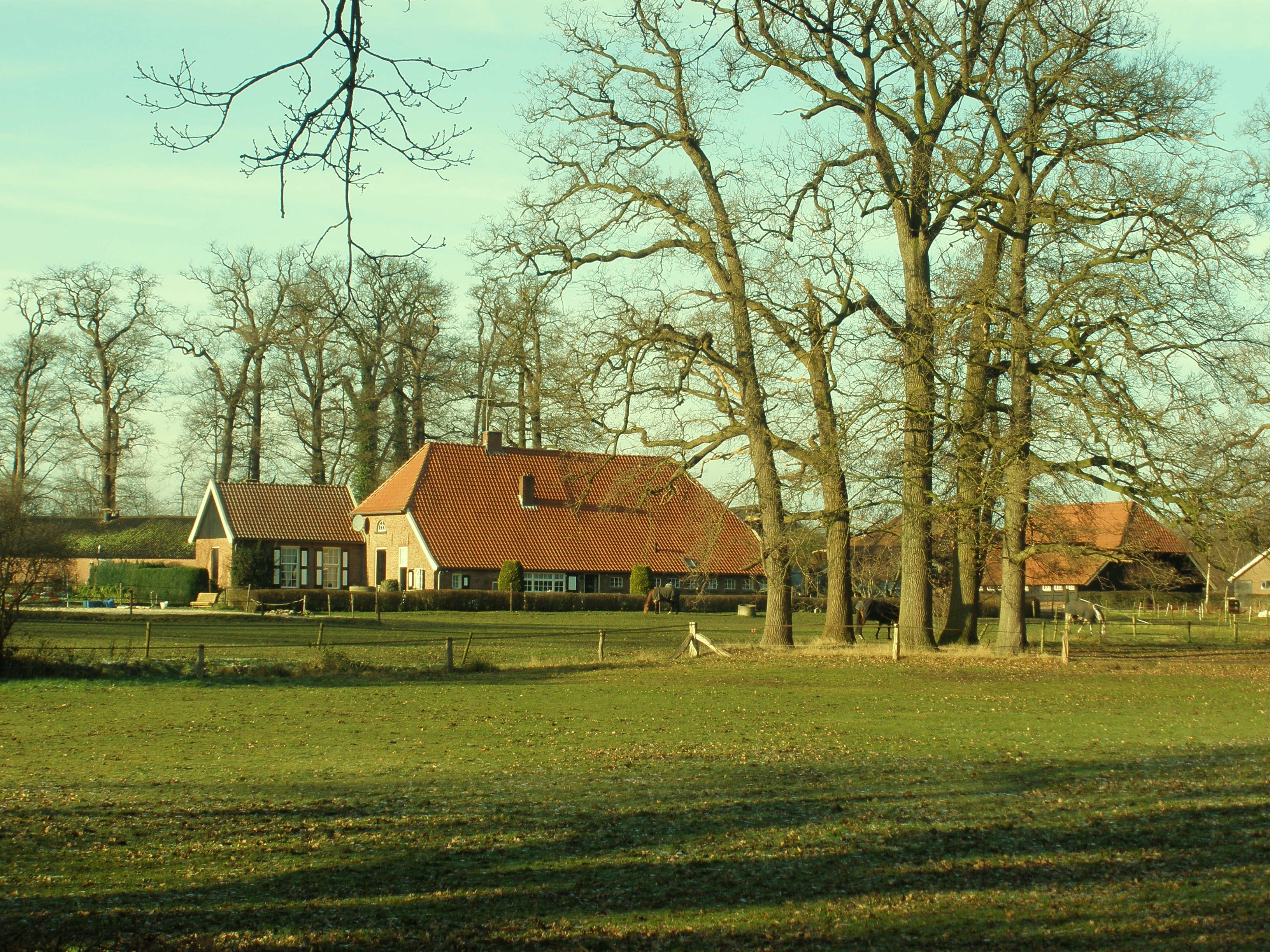 boerderij Ottenhof op de Deldener es